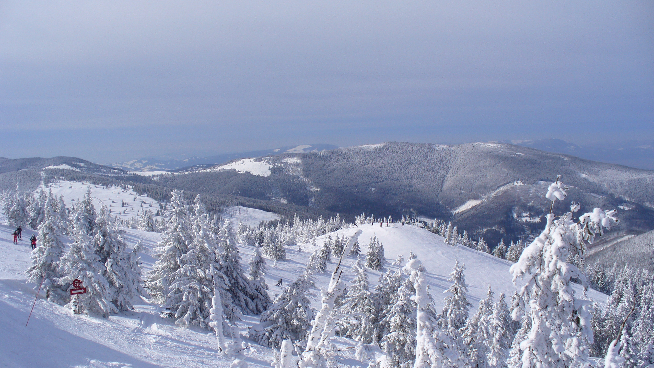 Winter in Żywiec Beskids